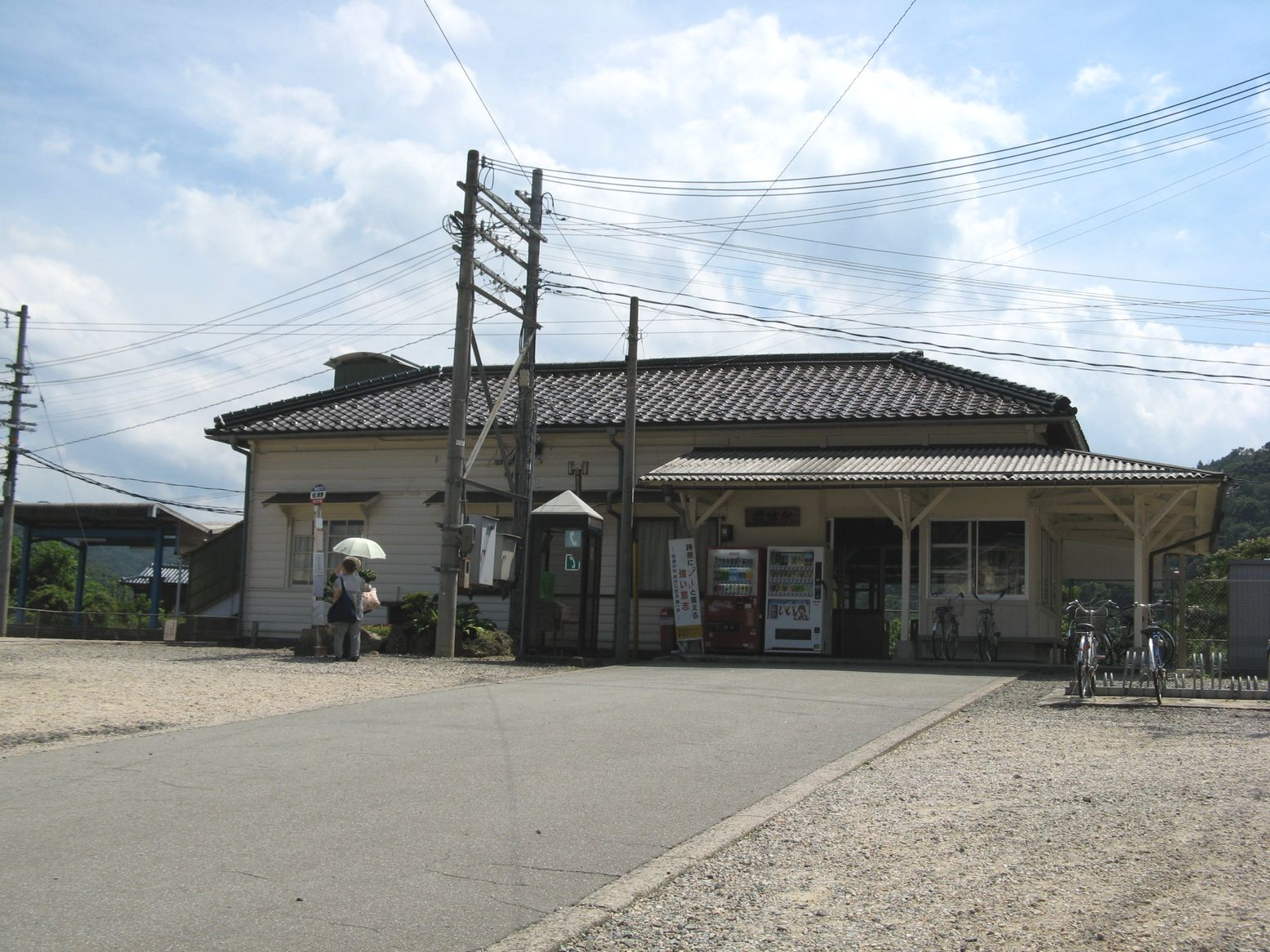 山陰本線佐津駅 駅舎 2007年8月 Bakkai撮影